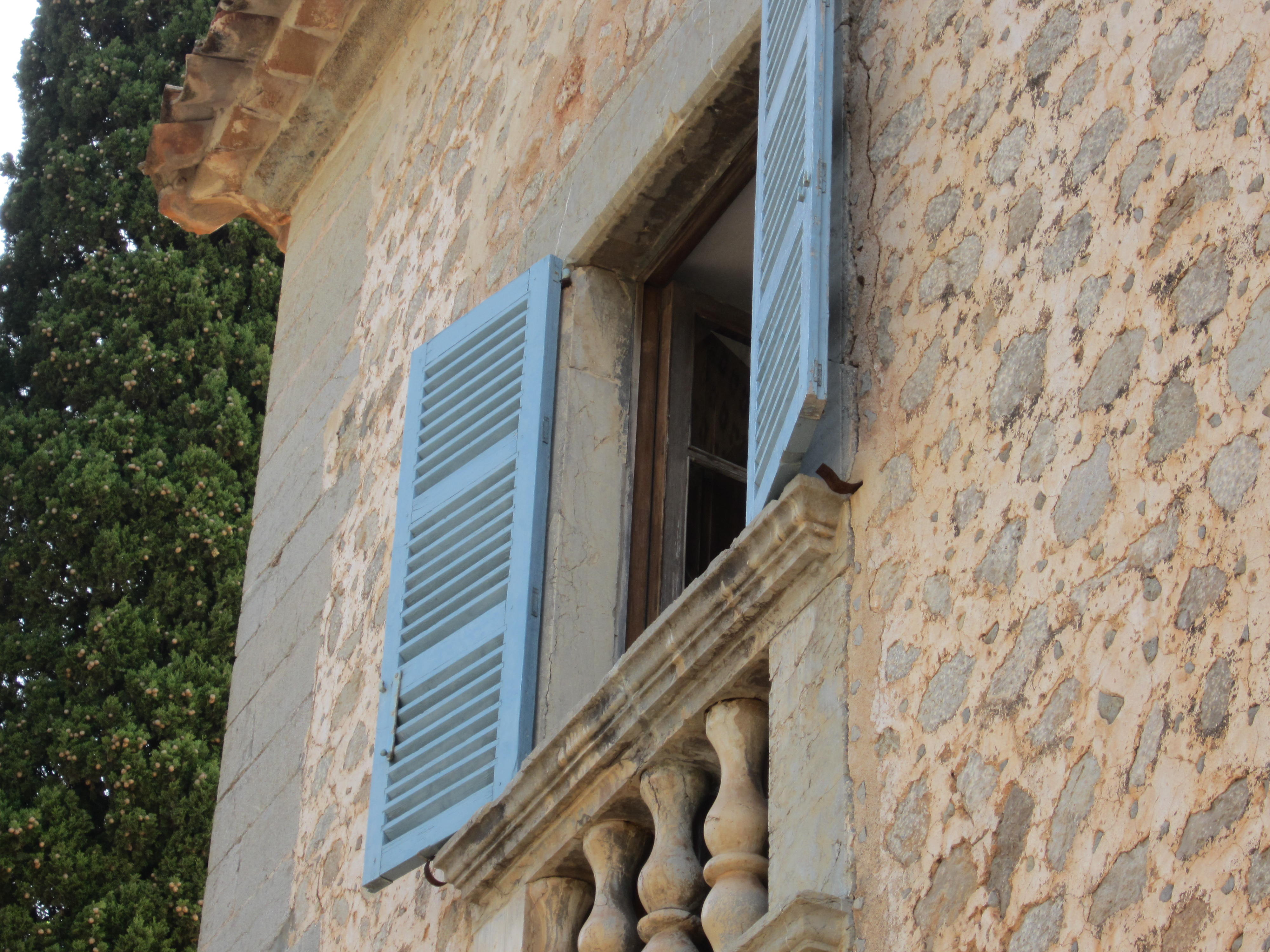 Possesió de can Fussimany, a Deià ( Mallorca). Detall d'una finestra.